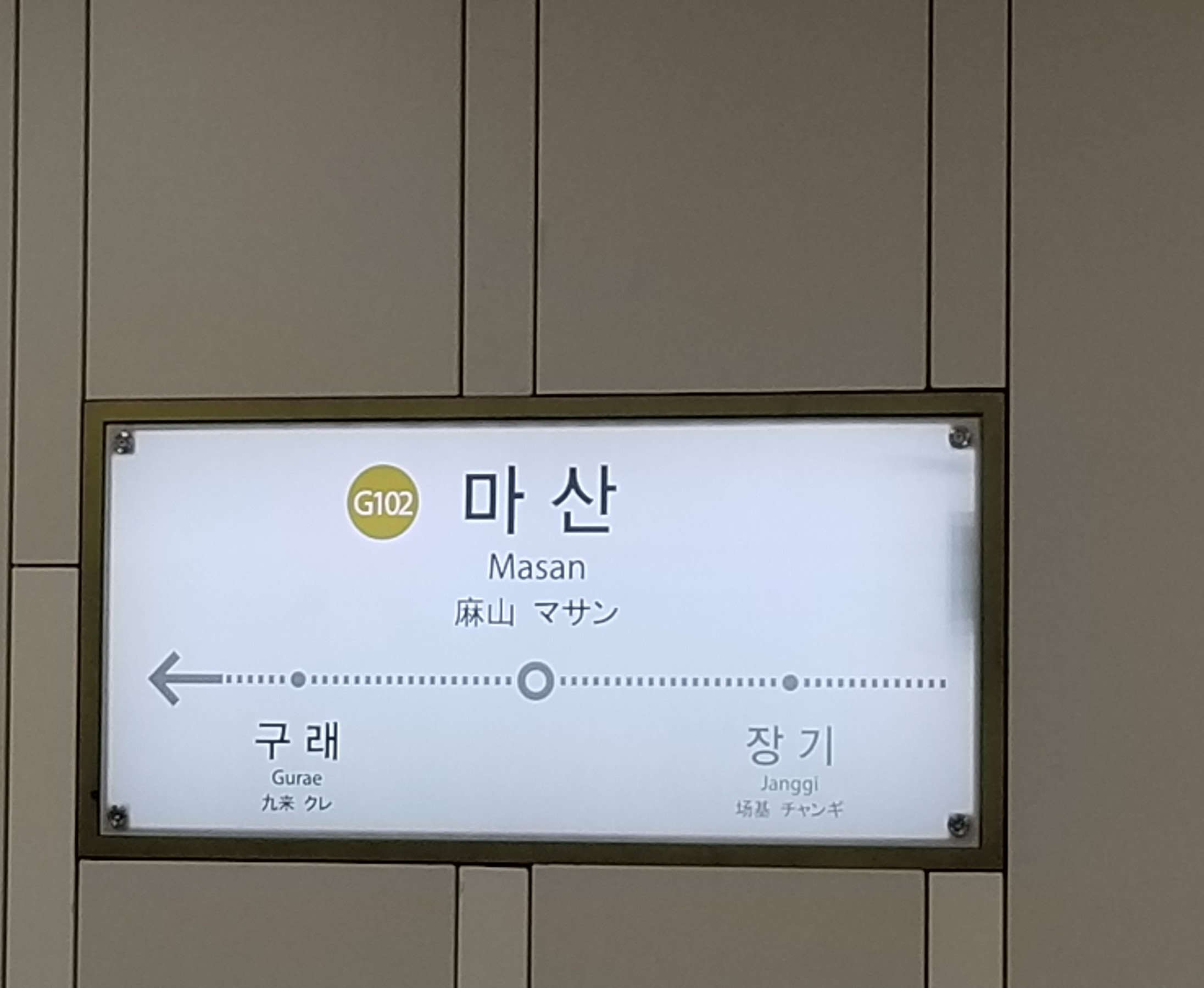 김포도시철도 마산역 역명판